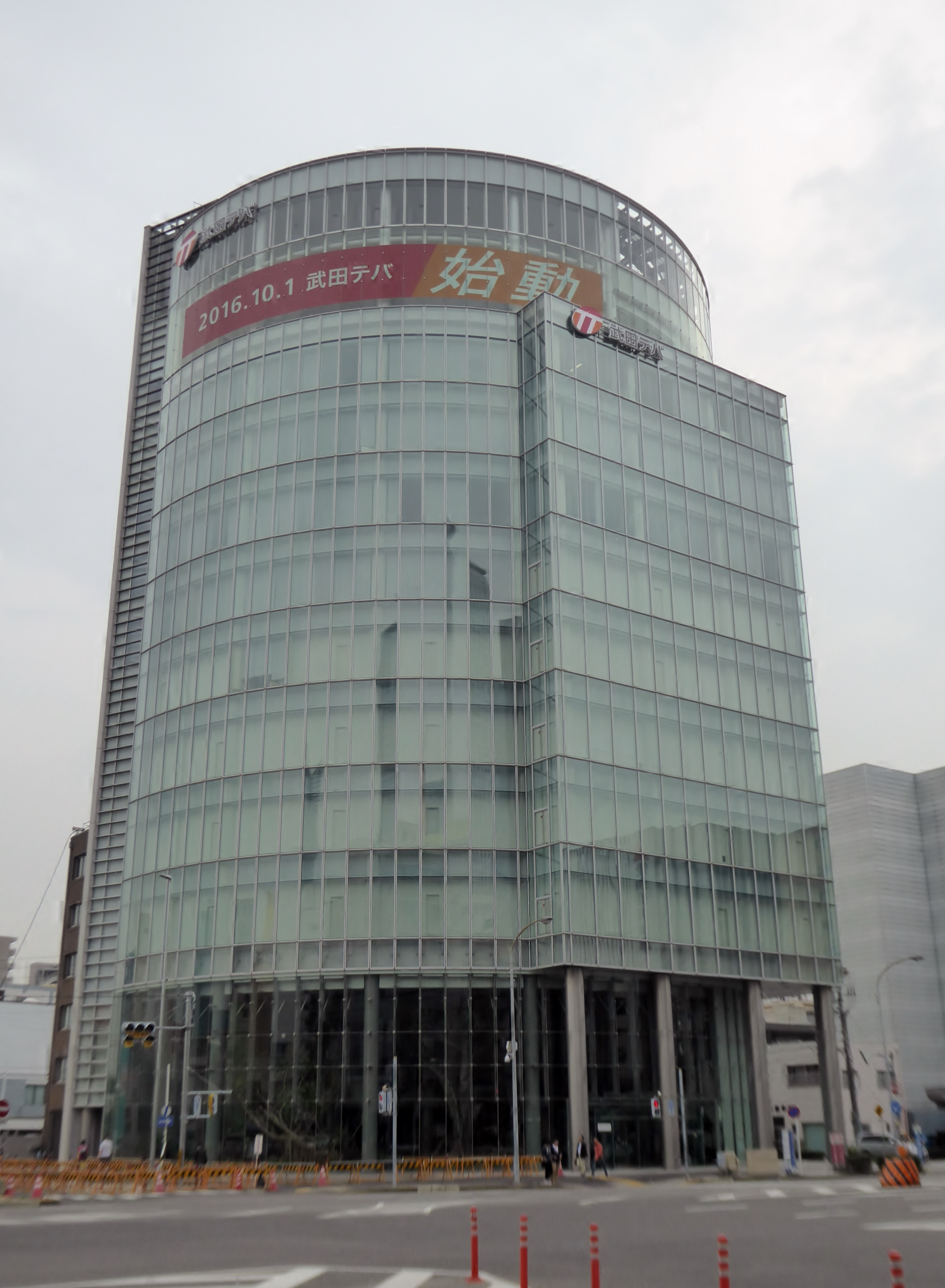 武田テバファーマ株式会社本社を撮影。